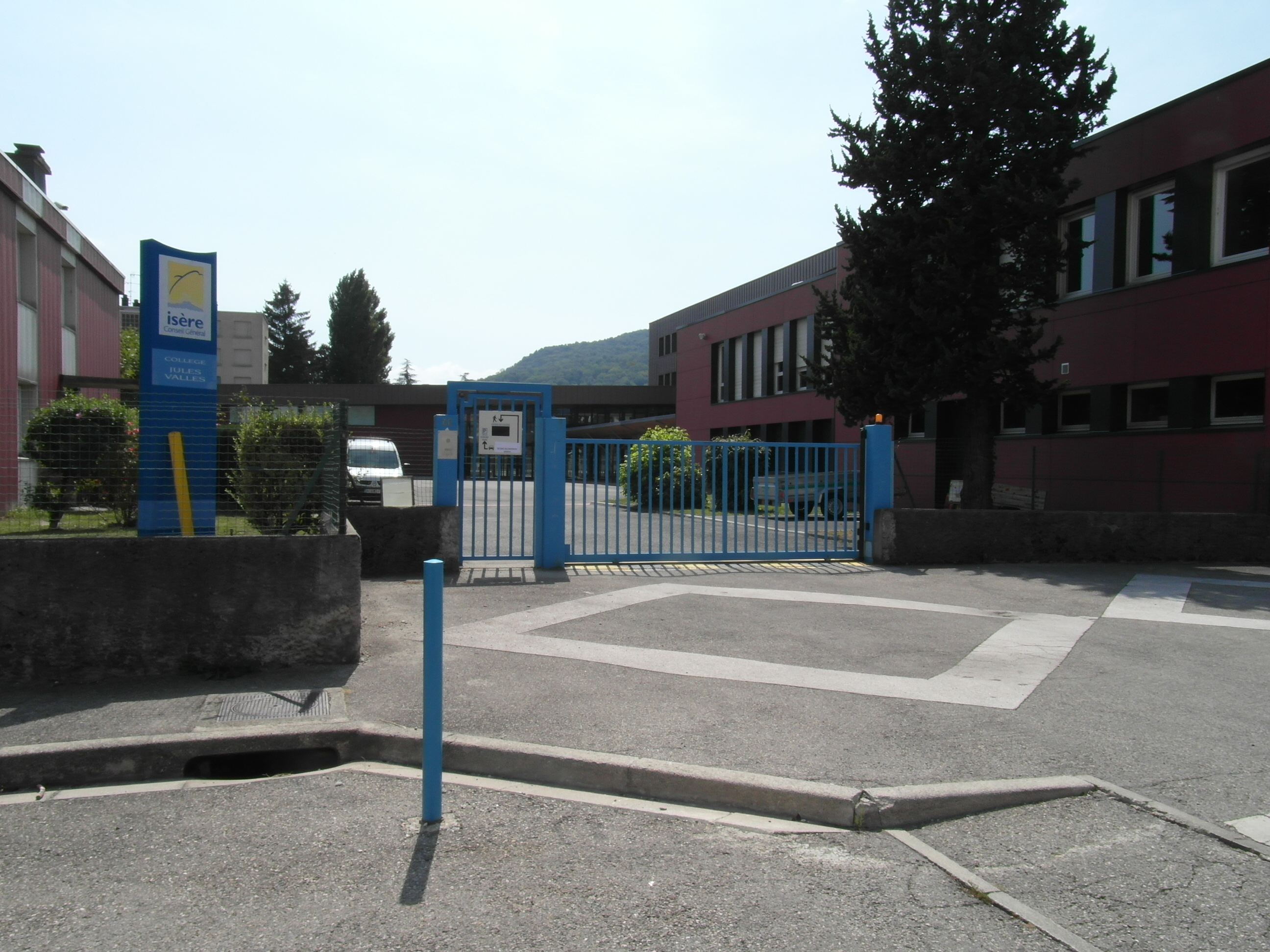 collège Jules Vallès